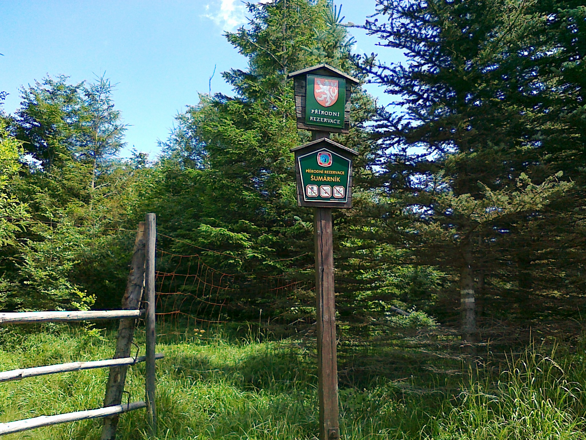 Tablica informacyjna do rezerwatu przyrody Šumárník